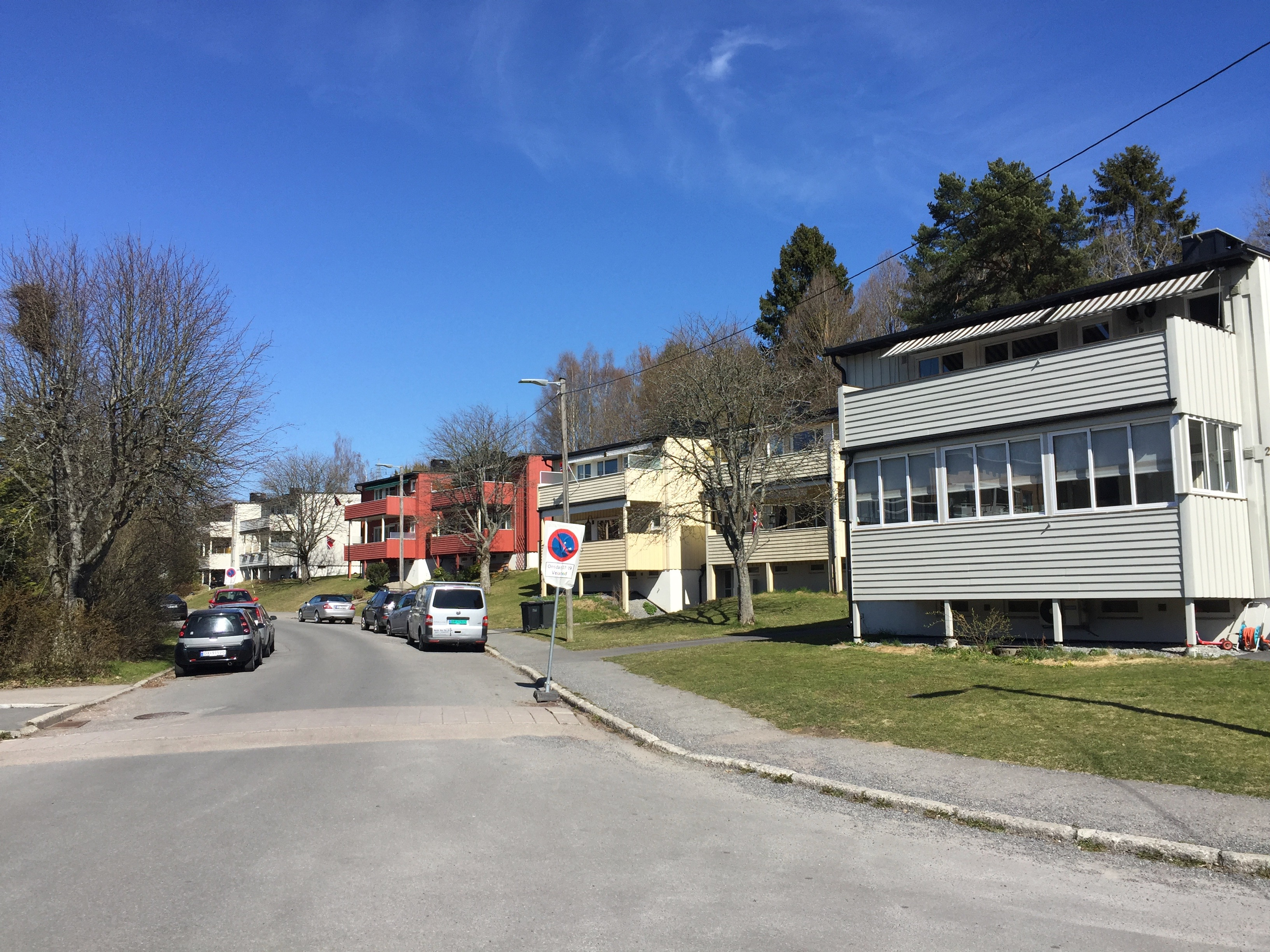 Treskeveien i Oslo.